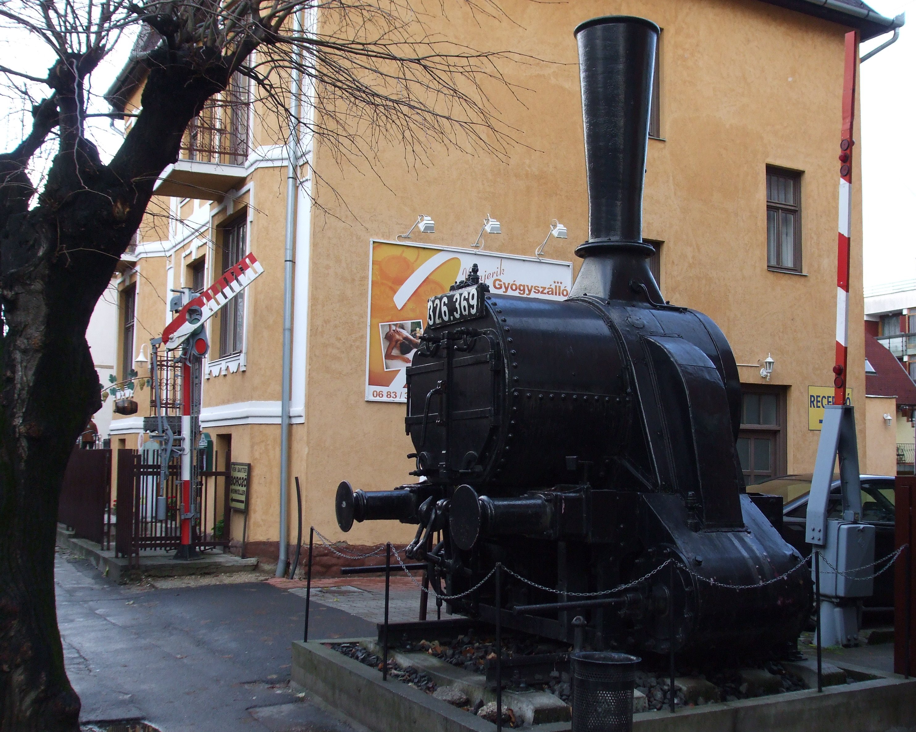 A MÁV 326, 369 pályaszámú gőzmozdonyának torzója Hévízen kiállítva a Majerik Gyógyszálló bejáratánál. A mozdony 1883-ban készült a Budapesti MÁV Gépgyárban. A MÁV-nál IIIe 412 pályaszámon állt forgalomba. 1891-ben átszámozták MÁV IIIe 2262-re. 1892-ben átépítették a MÁV budapesti főműhelyében, majd 1911-ben átszámozták 326, 012 pályaszámúra. Ezek után 1945-ben Csehszlovákiába került, majd 1950-ben mozdonycsere keretében visszatért Magyarországra. Új pályaszáma 326, 369 lett. 1969-ben selejtezték, majd 1973-ban kiállították Sopronban a Hotel Lokomotiv oldalára. Jelenlegi helyére 2002-ben került. A háttérben egy kétfogalmú alak főjelző látható, az eredeti magasságánál alacsonyabbra vágva.